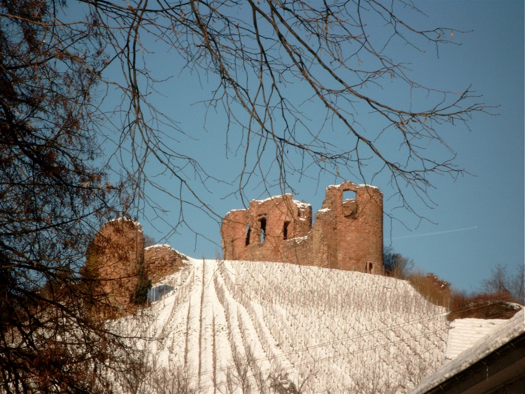 Die Gutenburg bei Gutenberg (Rheinland-Pfalz)